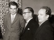 Cropped from File:Aapelijakirjailijat-1960.jpg From left to right: Pentti Saarikoski, Simo Puupponen, Veijo Meri